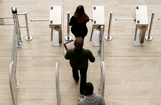 Klebelsberg Könyvtár lopásgátló kapui, Szeged